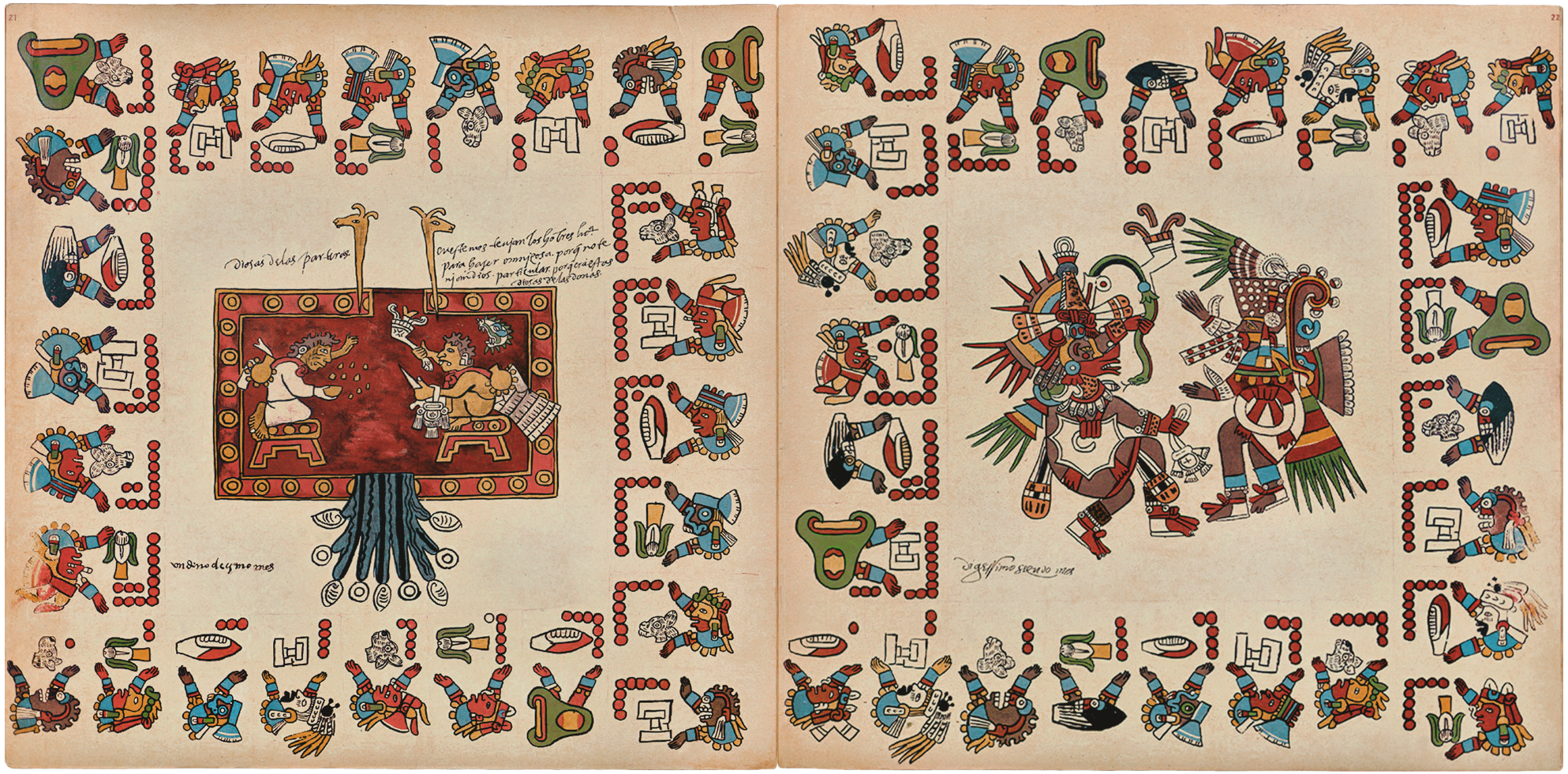 Planches 21 et 22 du codex Borbonicus. Étalonnage des couleurs en correspondance avec l'oeuvre originale.